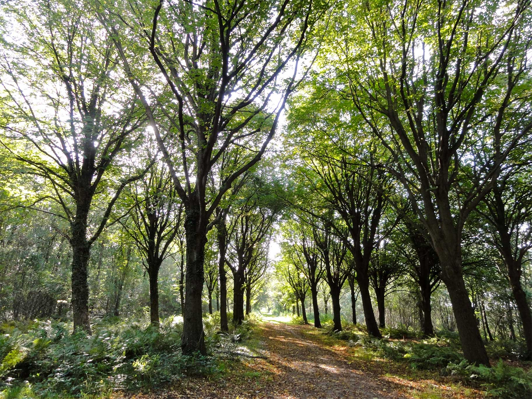 Lindenlaan in het Harichsterbos